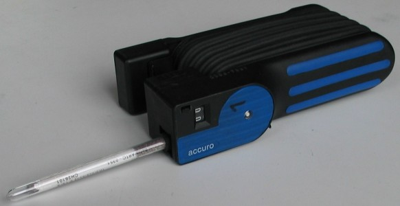 Diese Bild zeigt eine manuelle Gasspürpumpe.